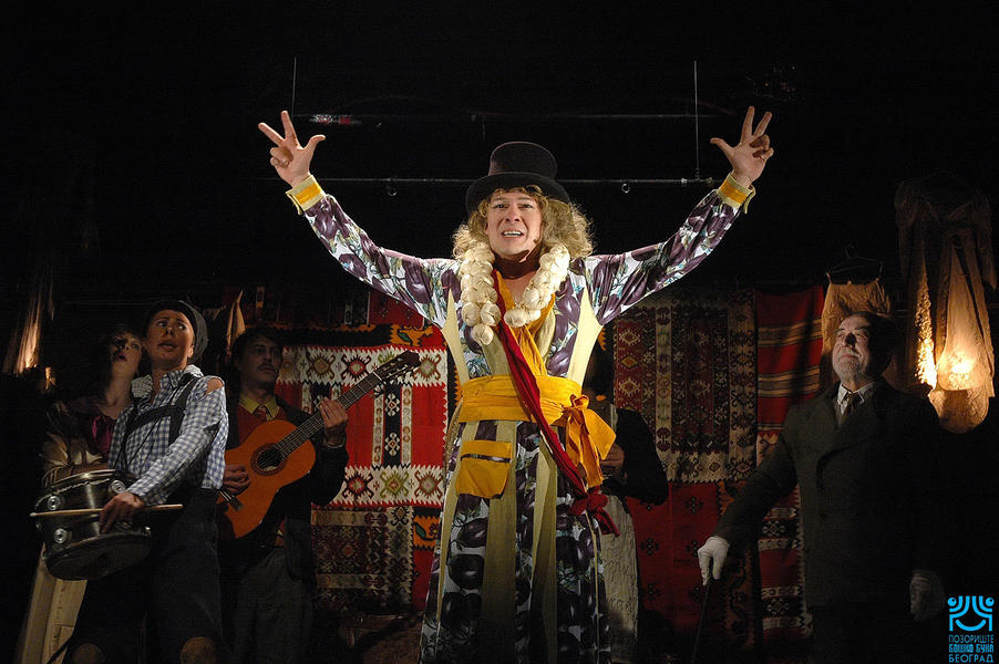 Српски (ћирилица): Сцене са премијере позоришне представе "Госпођа Министарка" у извођењу ансамбла позоришта Бошко Буха. На слици Горан Јевтић у улози Живке Поповић - Госпође Министарке.